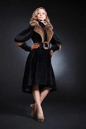 Мутоновая шуба от Пятигорской фабрики Аннушка